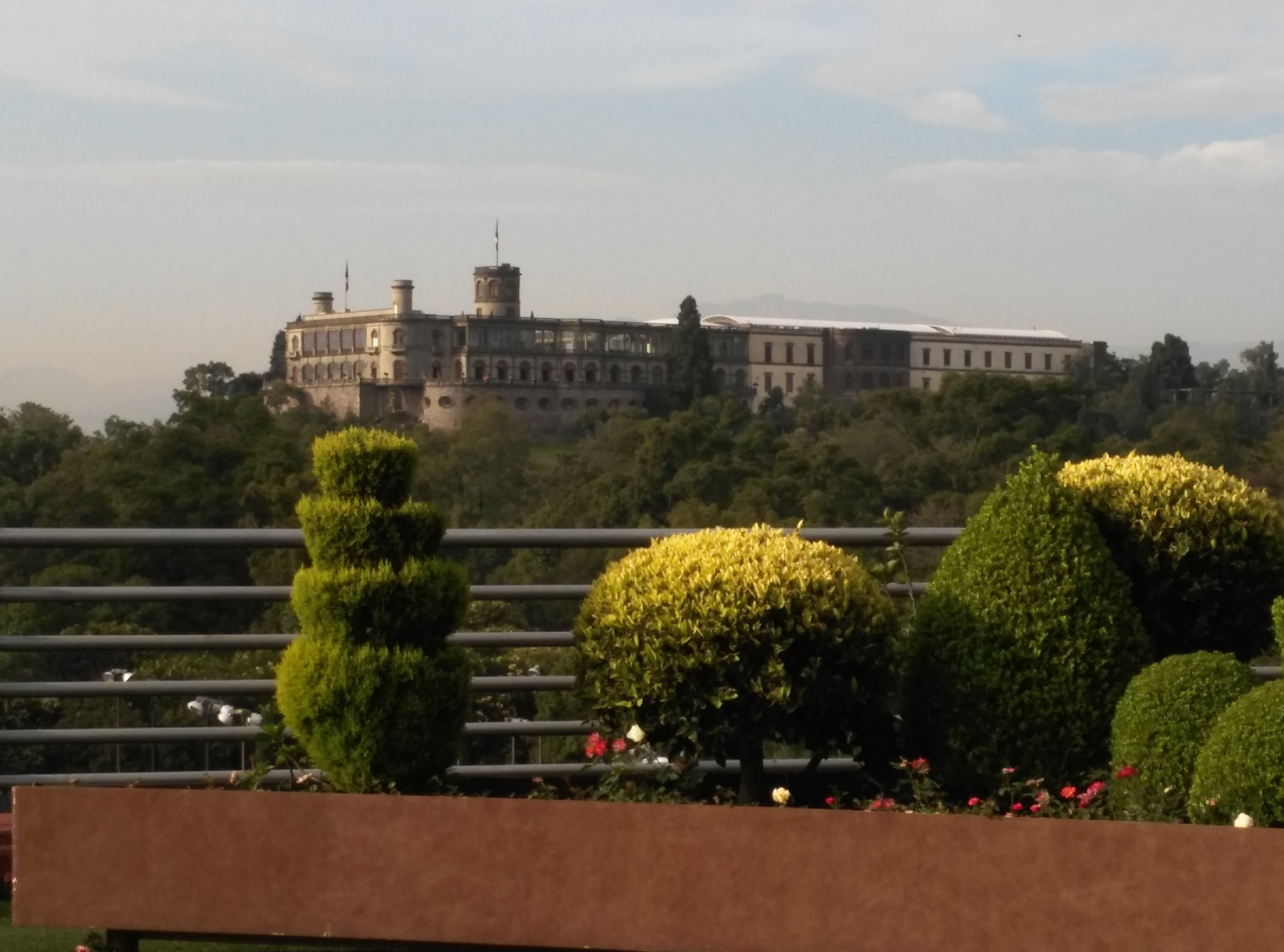 Castillo Chapultepec